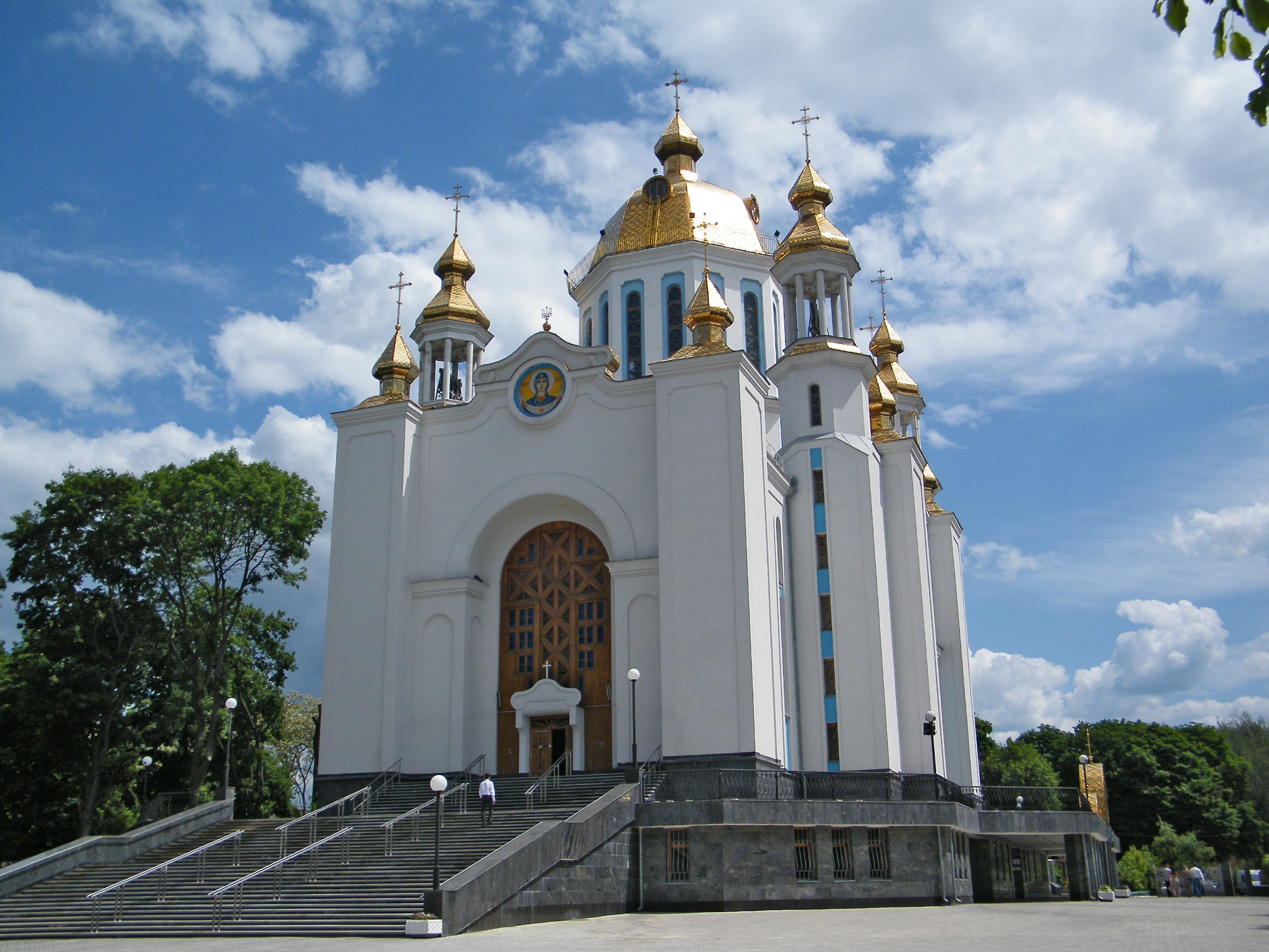 Покровский собор